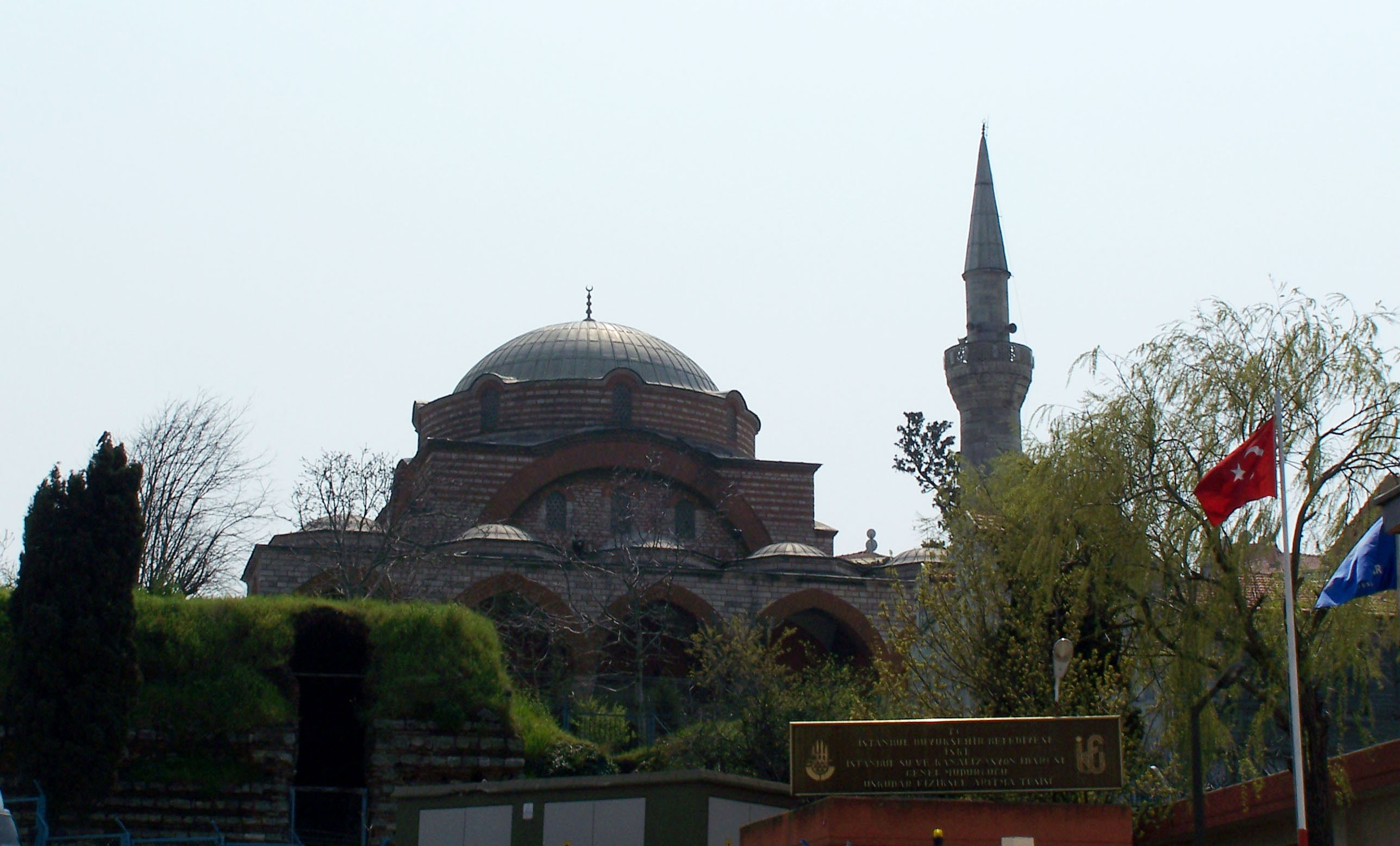 Rumi Mehmet Paşa Camii in Üsküdar, İstanbul, Turkey